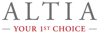 Altia logo